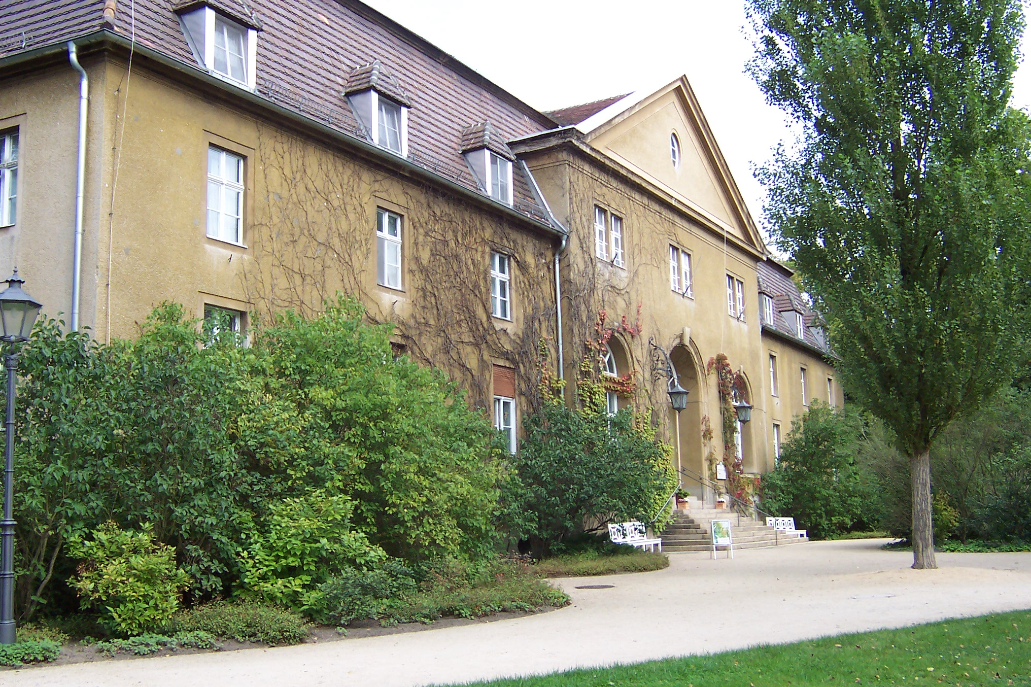 Kavaliershaus im Muskauer Park von Süden